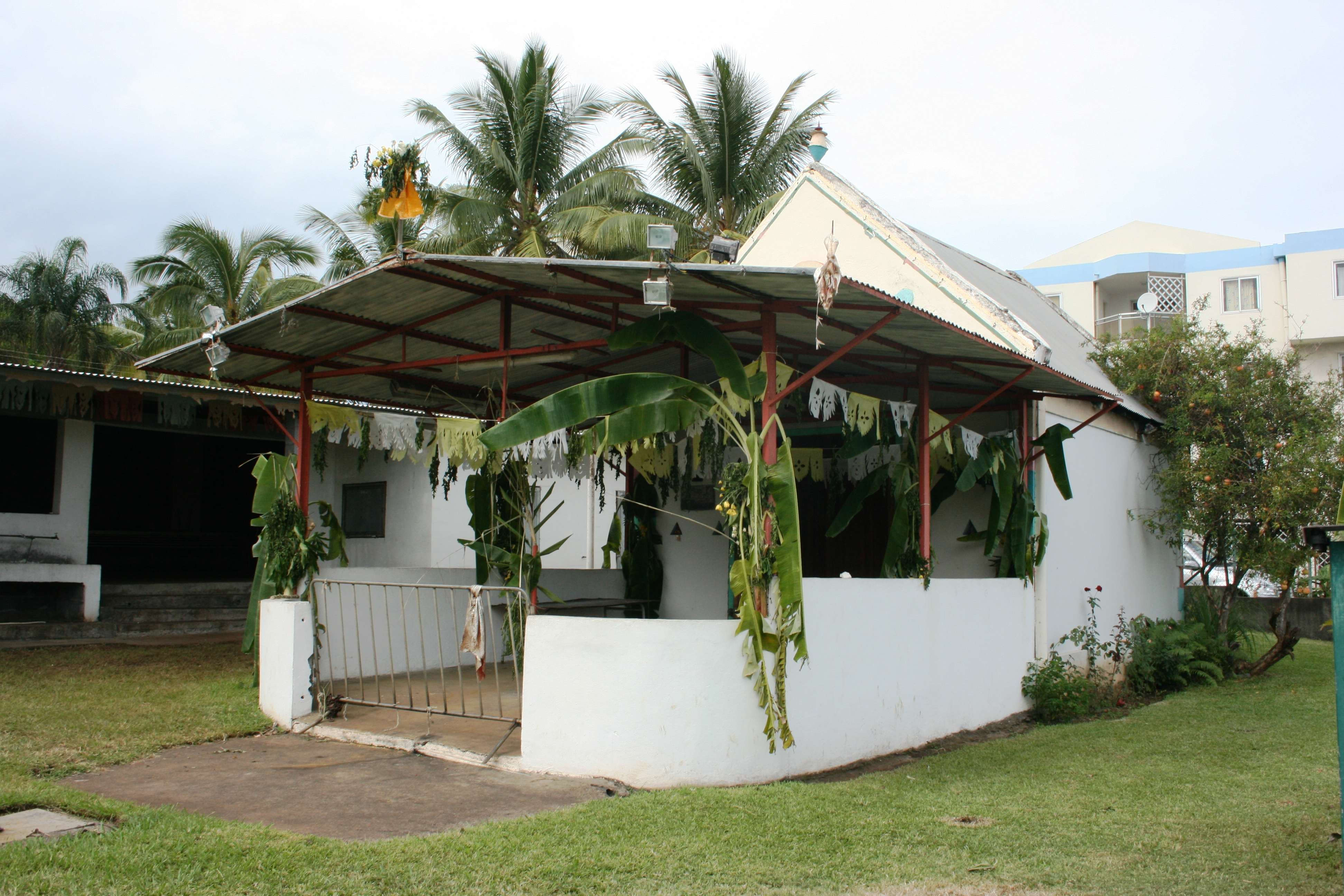 Le temple des Casernes, à Saint-Pierre de La Réunion.